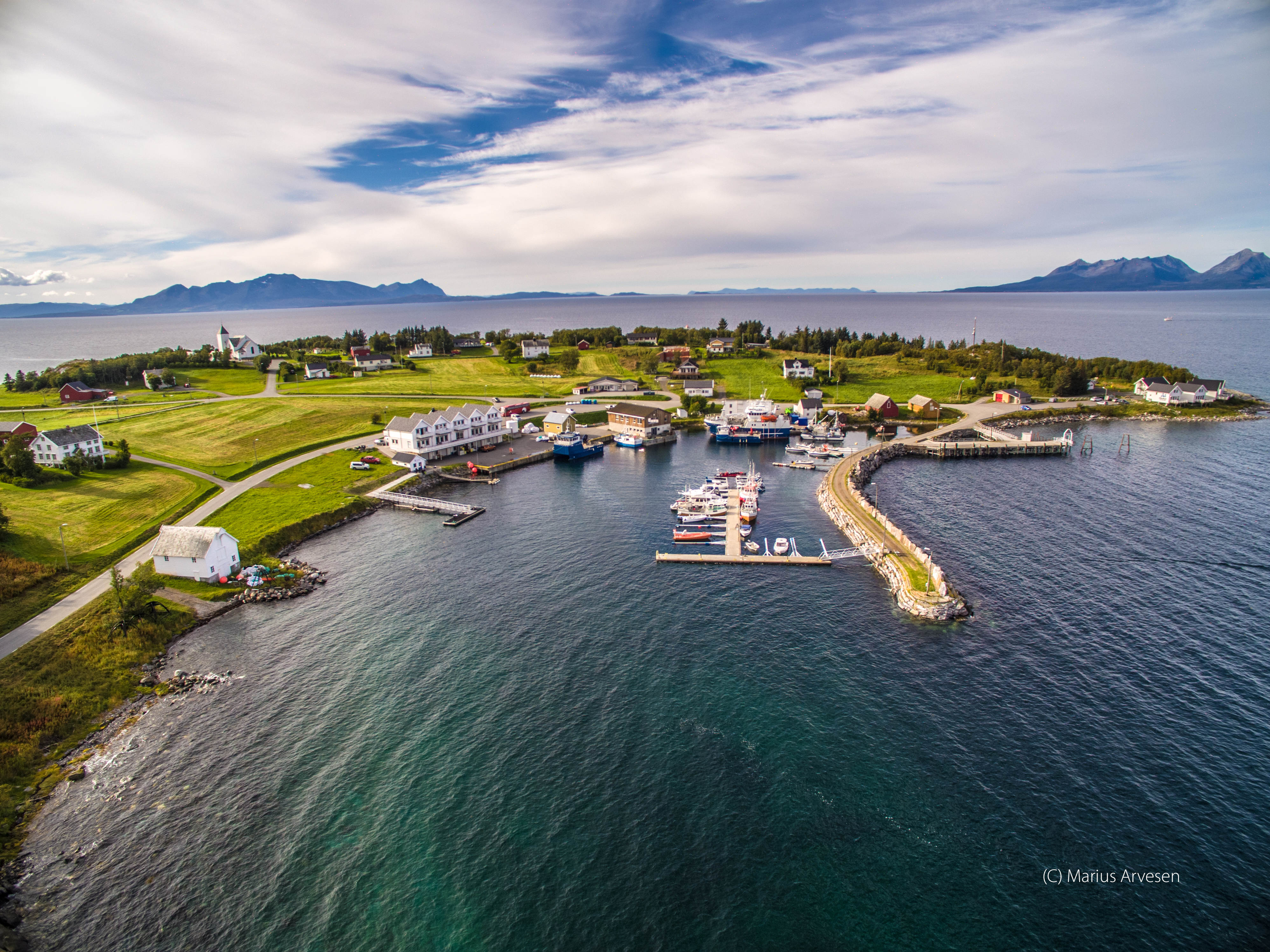 Her ser en Engenes fra luften med sin havnevirksomhet, rorbuer, konferanseanlegg, kirke, storslåtte marker og ikke minst fyrlykt.